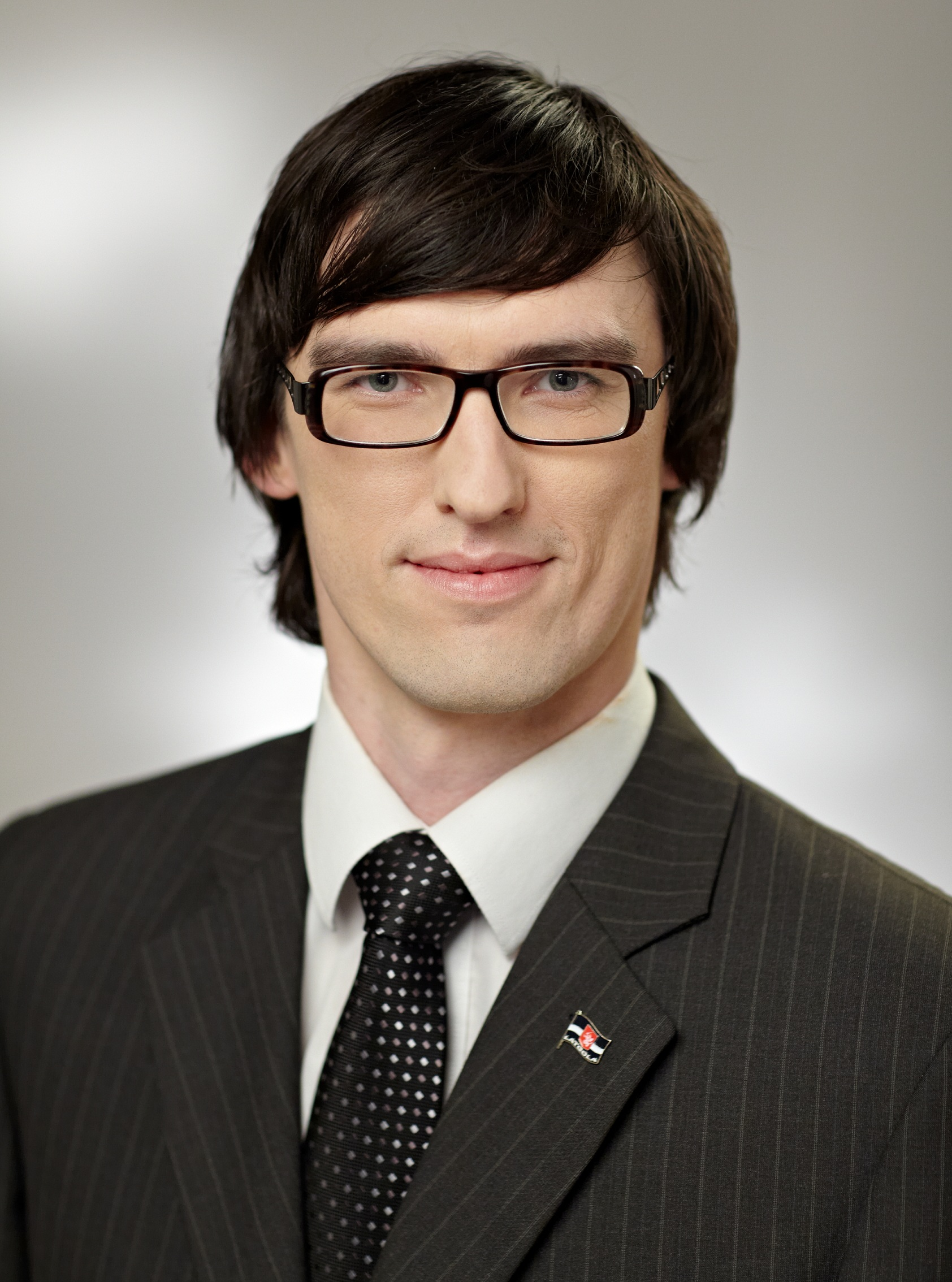 Foto: Valts Kleins, Secret Garden Studio